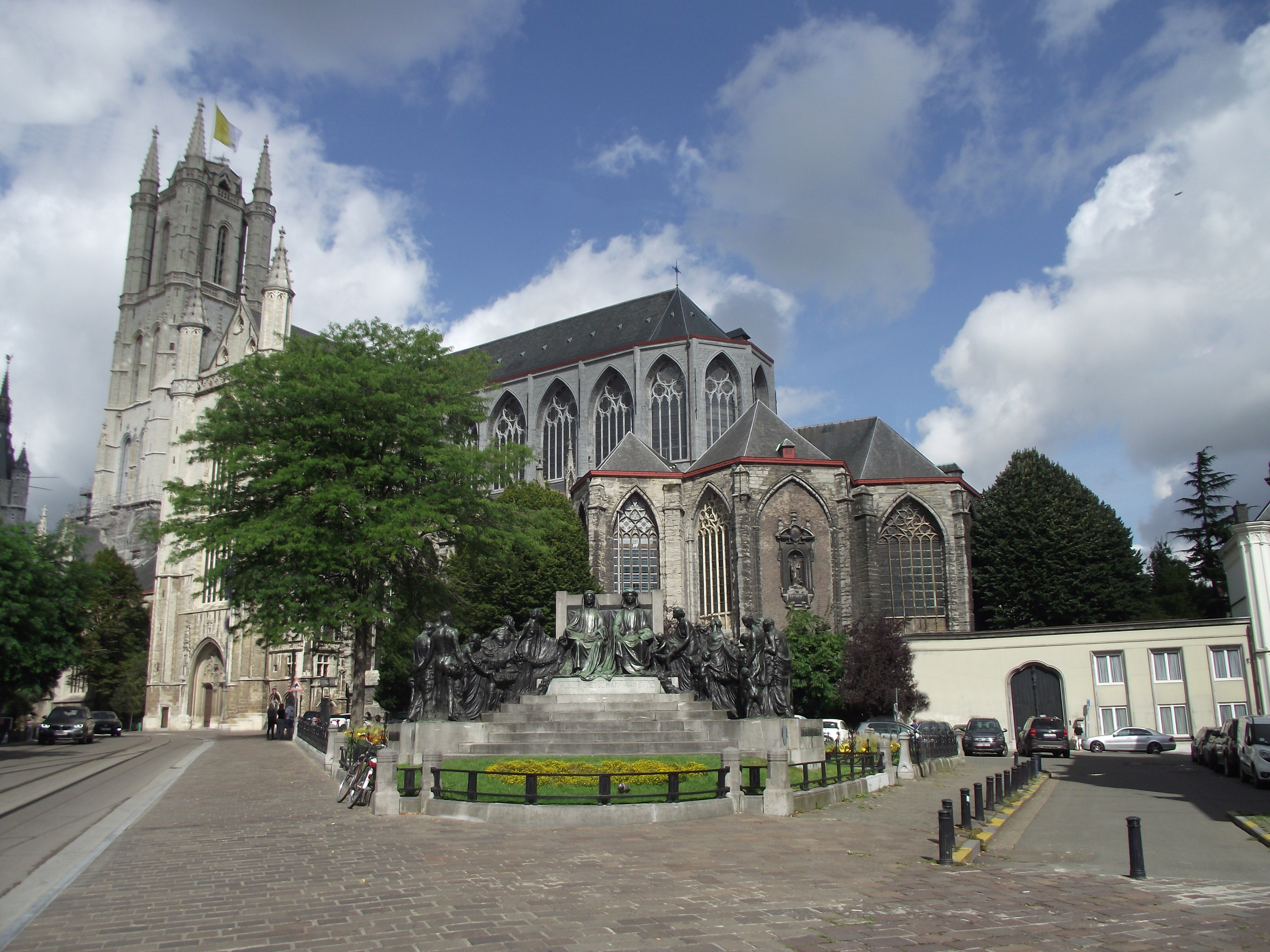 Gent, Sint-Baafskathedraal